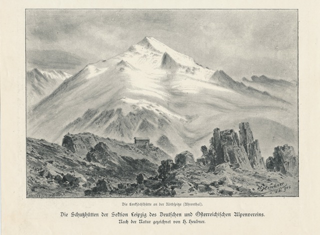 Lenkjöchlhütte historisch